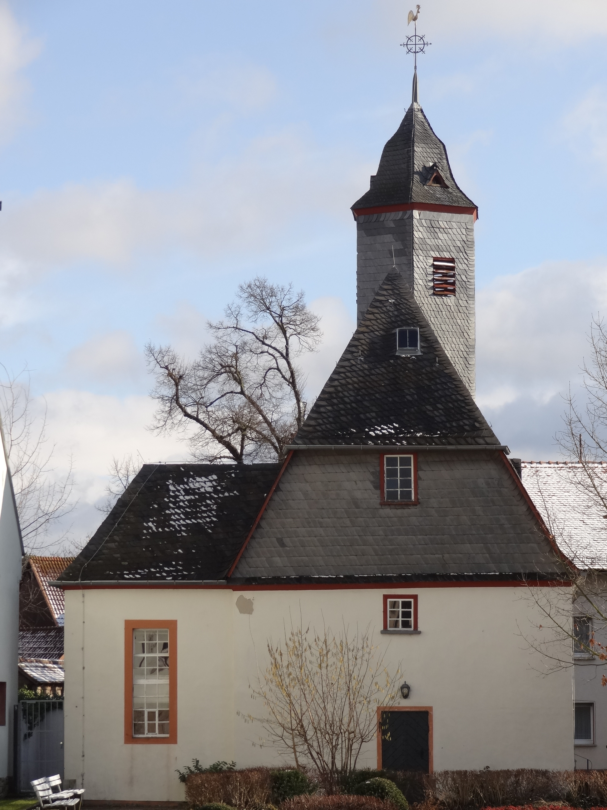 Evangelische Kirche Pohl-Göns von Westen 03.JPG